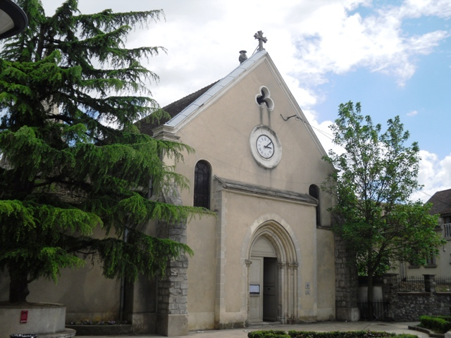 Façade de l'église Saint-Denis d'Athis-Mons (91)